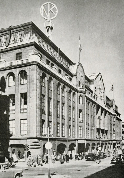 NK-klockan februari 1958